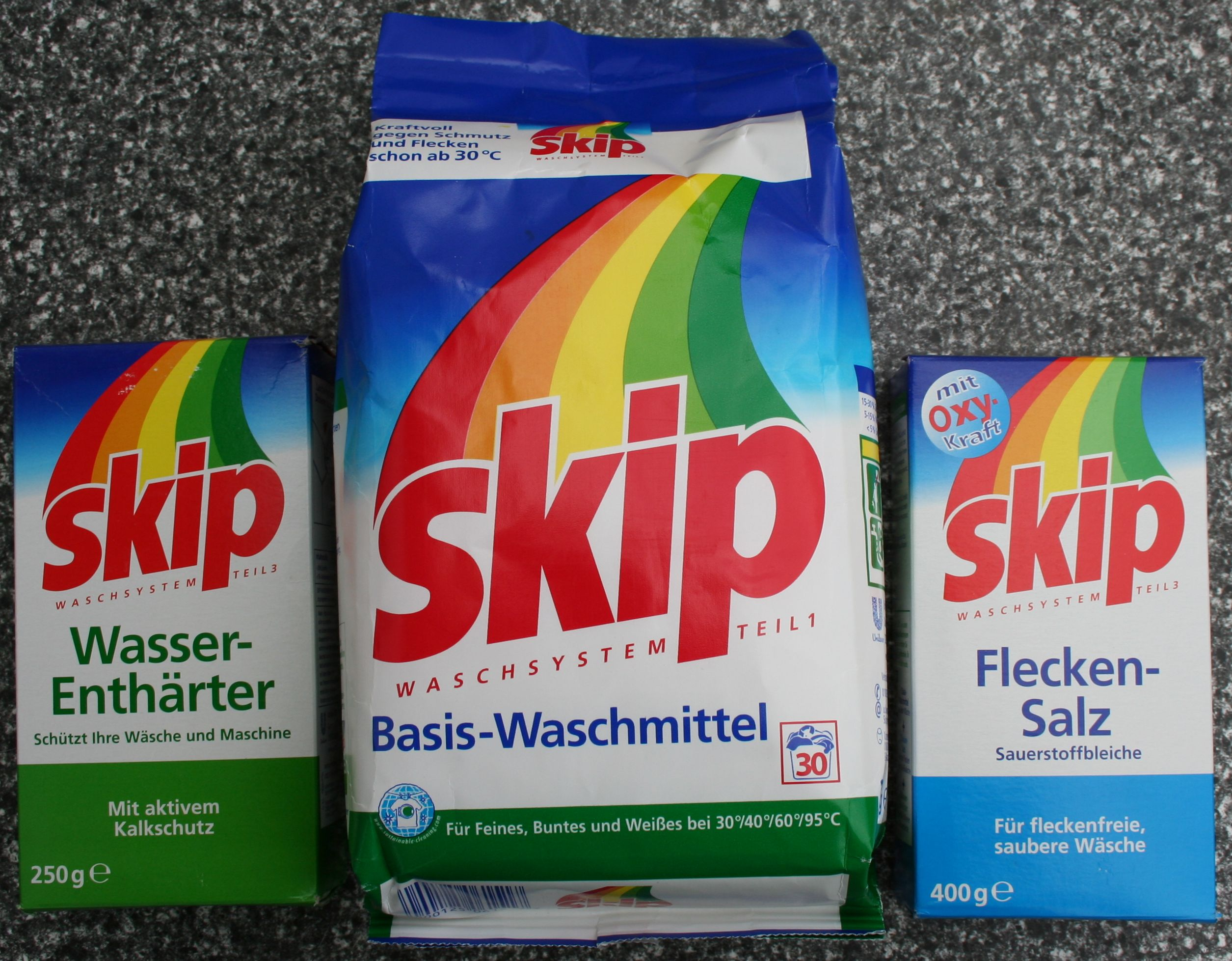 Alle Komponenten eines Baukastenwaschmittels (Der Hersteller hat die Nummerierung falsch aufgedruckt)